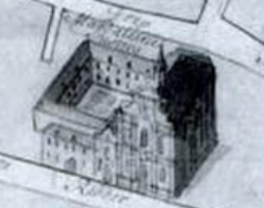 Magdalonettenklooster, Brussel